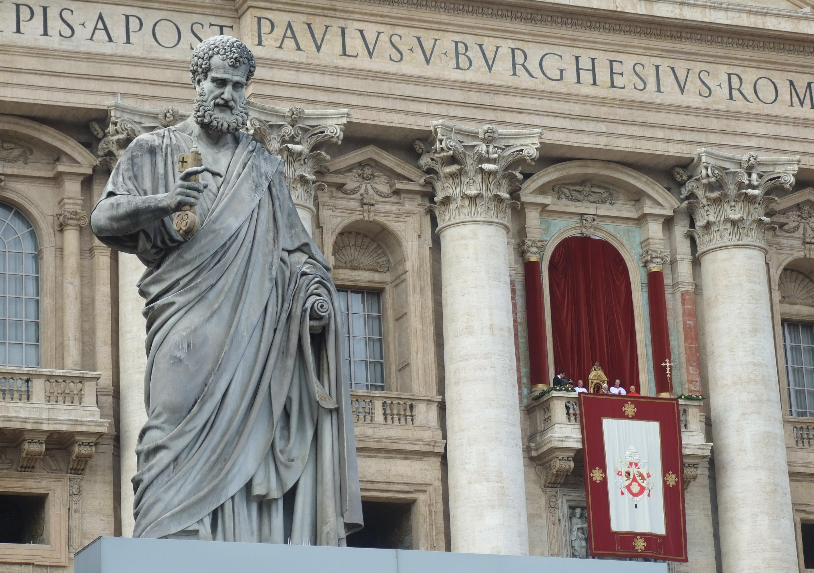 Benedicto XVI el dia de Navidad en la Plaza San Pedro.